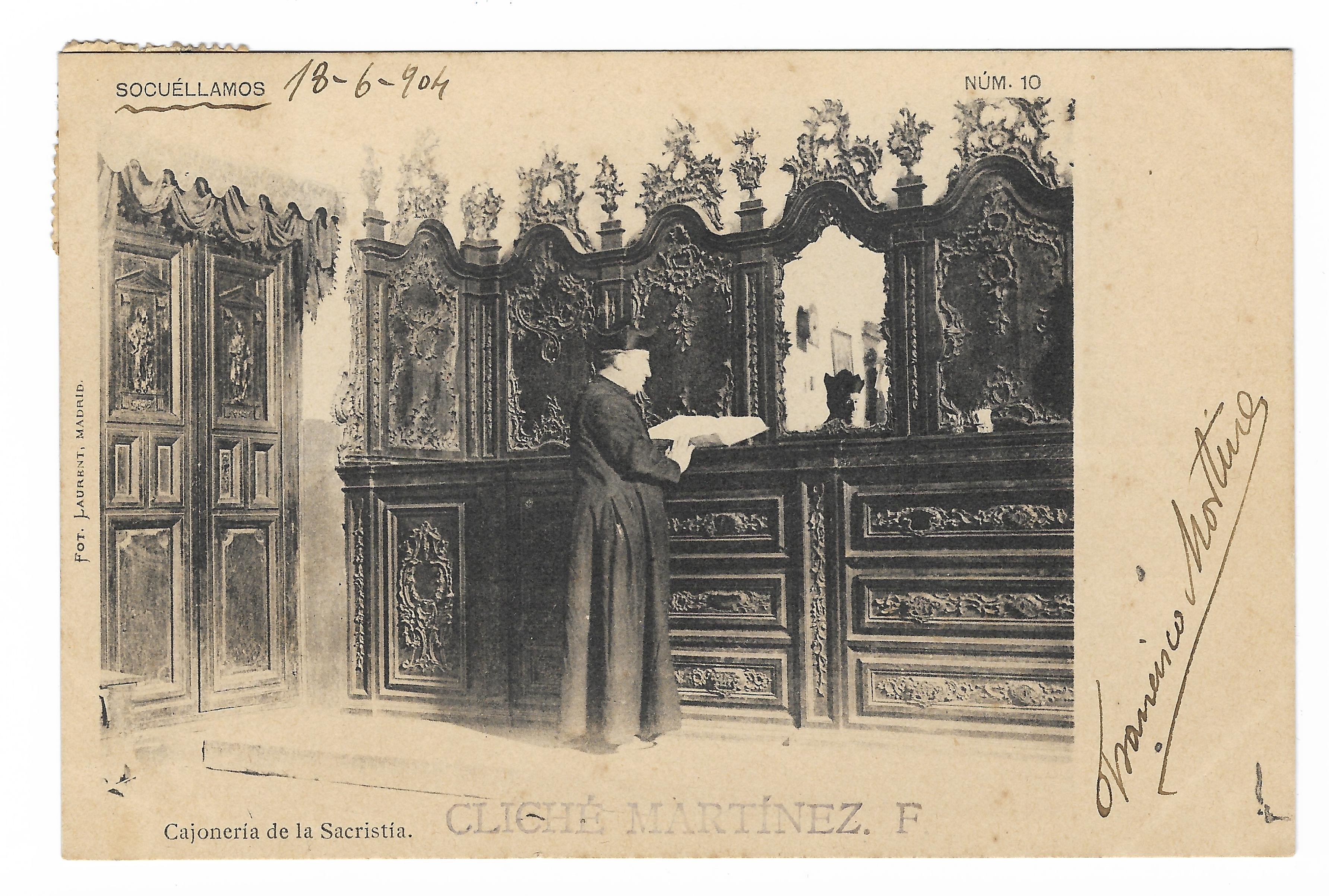 Tarjeta postal de Socuéllamos, de la serie de 10, editadas en 1903 con las imágenes de los lugares y rincones más característicos de la localidad.